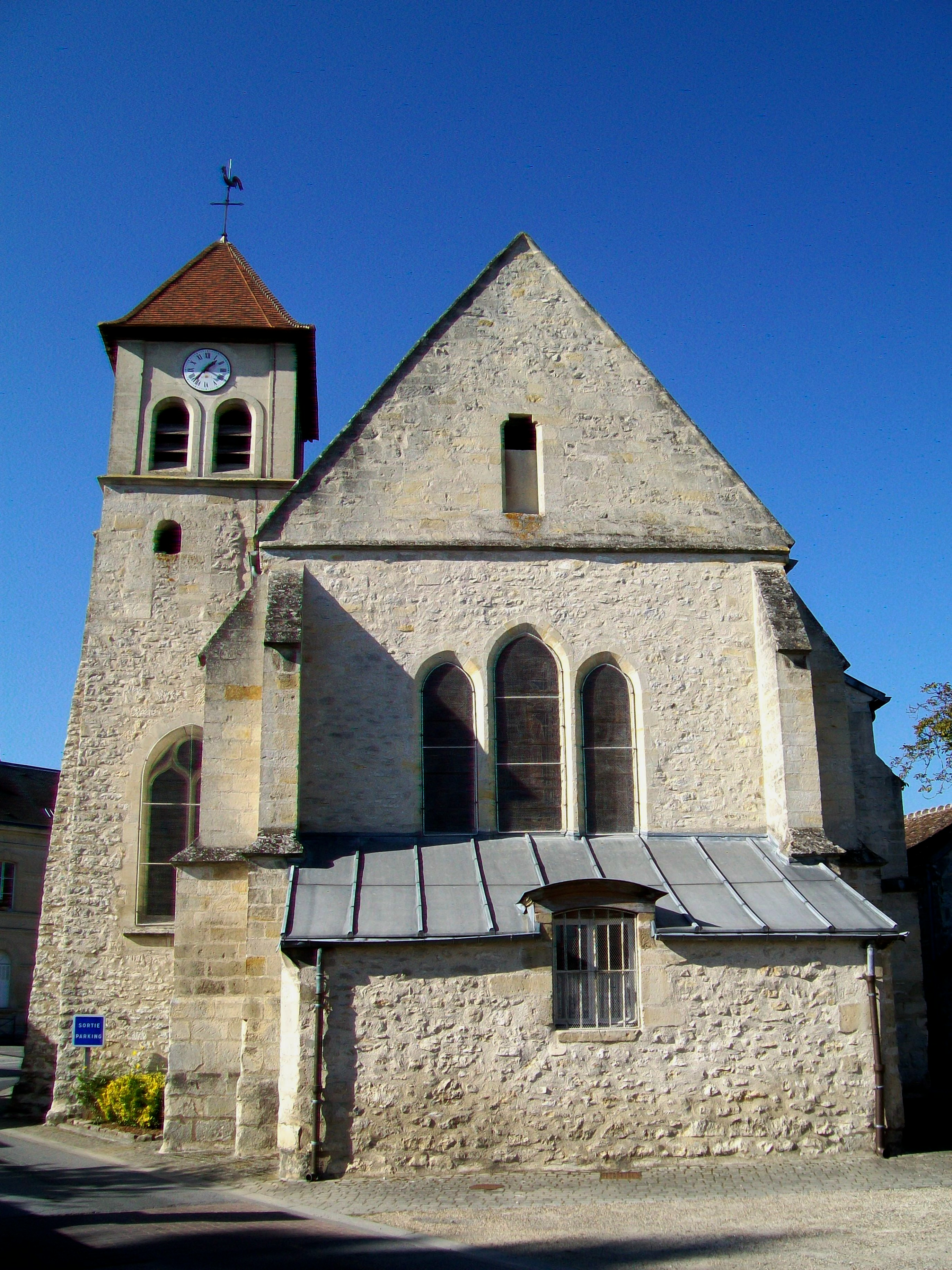 La façade est de l'église Saint-Léonard. Le chevet est éclairé par un triplet de lancettes.